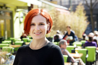 Kipping